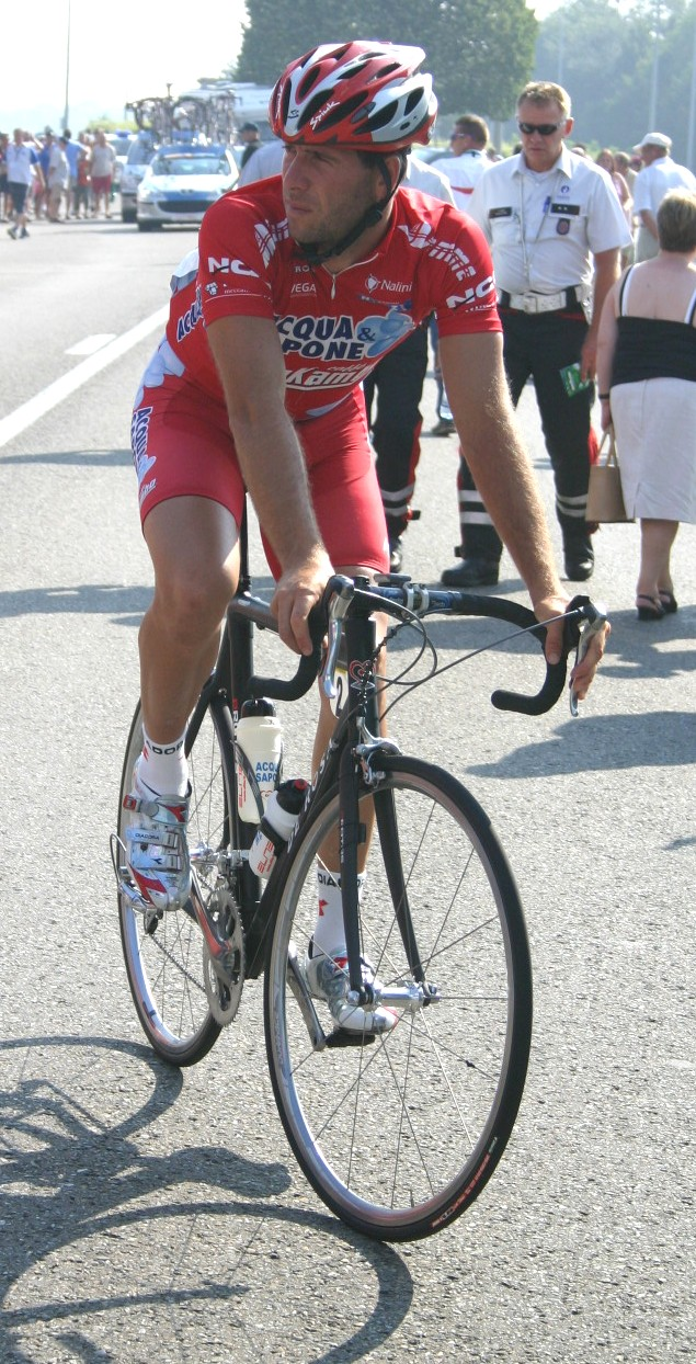 Foto genomen voor de start van de derde rit van de Tour De La Région Wallonne van Mettet naar Saint - Hubert over 205,4 km.